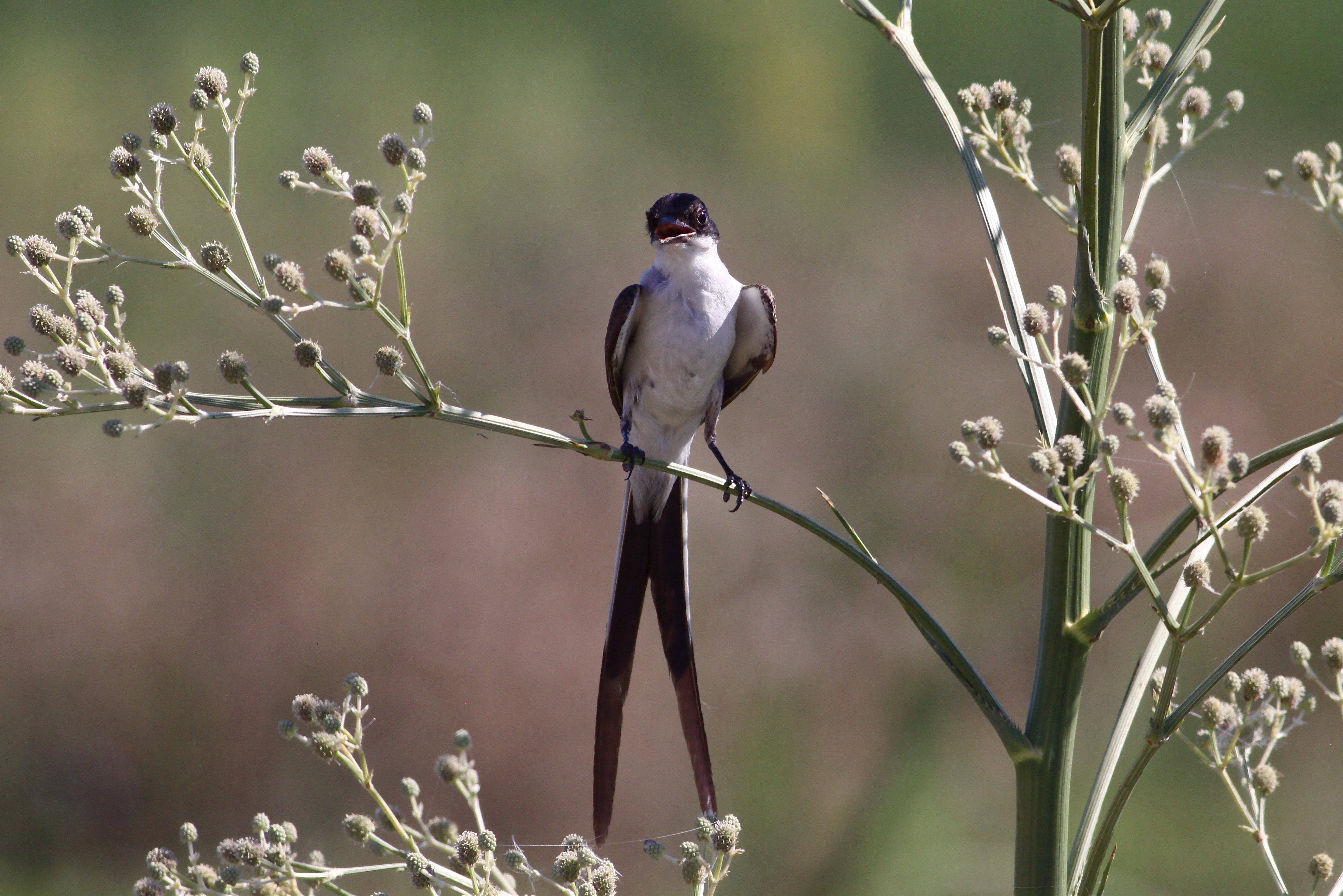 Ceibas area, Entre Rios, Argentina